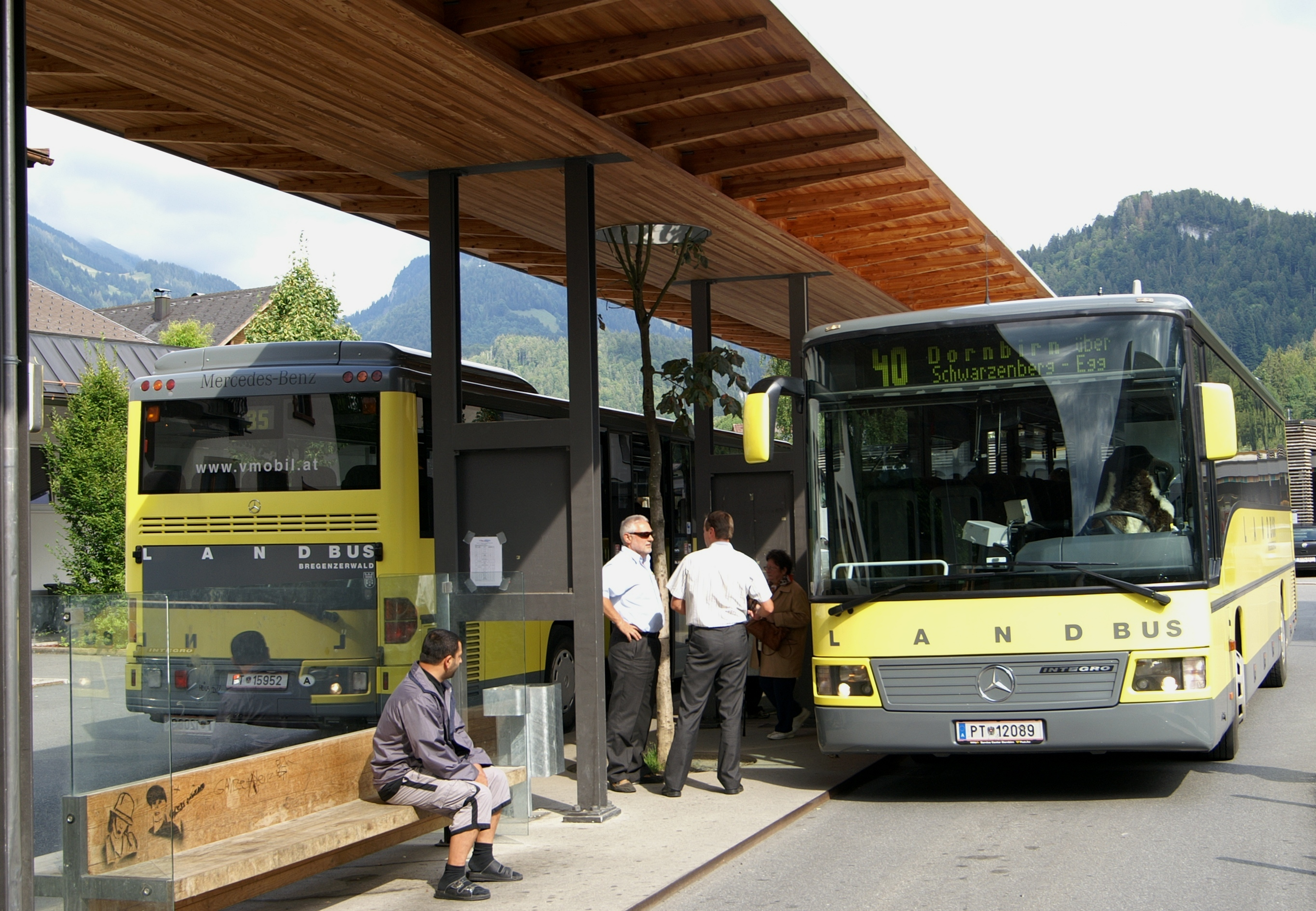 der Landbus Bregenzerwald von Damüls über Au (Vorarlberg), Bezau, Alberschwende nach Dornbirn